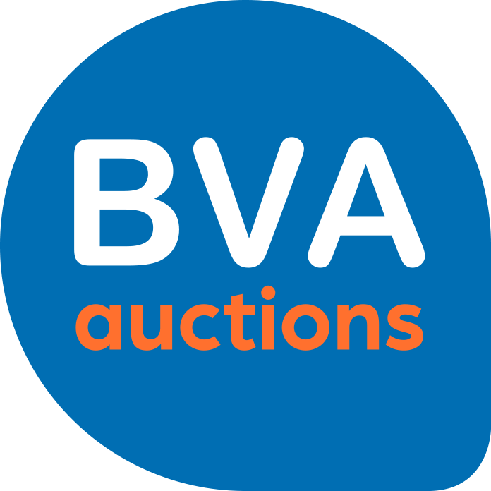 Europees veiling marketplace in re-commerce. Maandelijks 140.000 bijzondere kavels uit slapende voorraad, retouren, overstock en bedrijfsbeëindigingen.